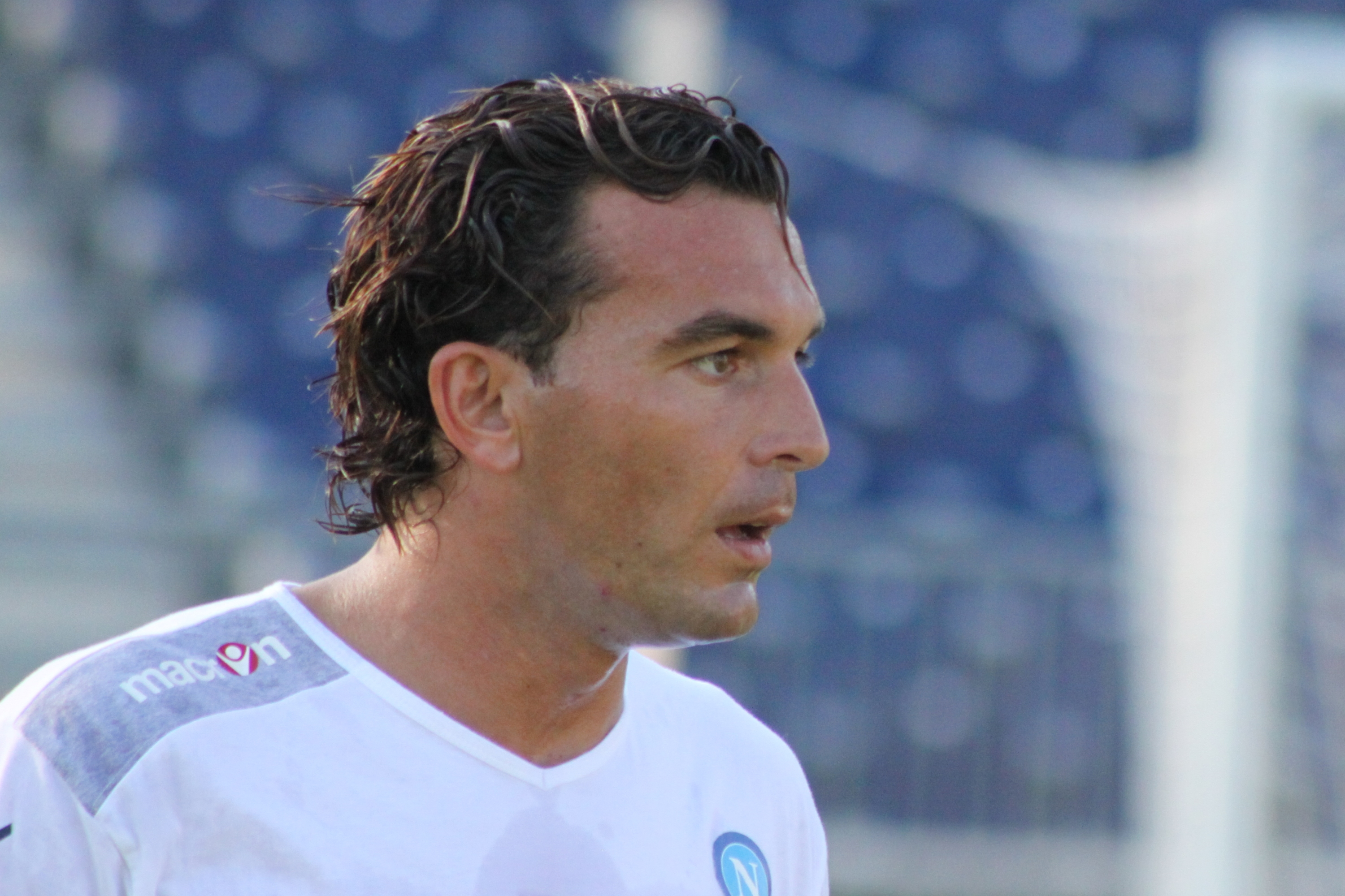 Salvatore Aronica - SSC Neapel (2) Salvatore Aronica - Società Sportiva Calcio Napoli